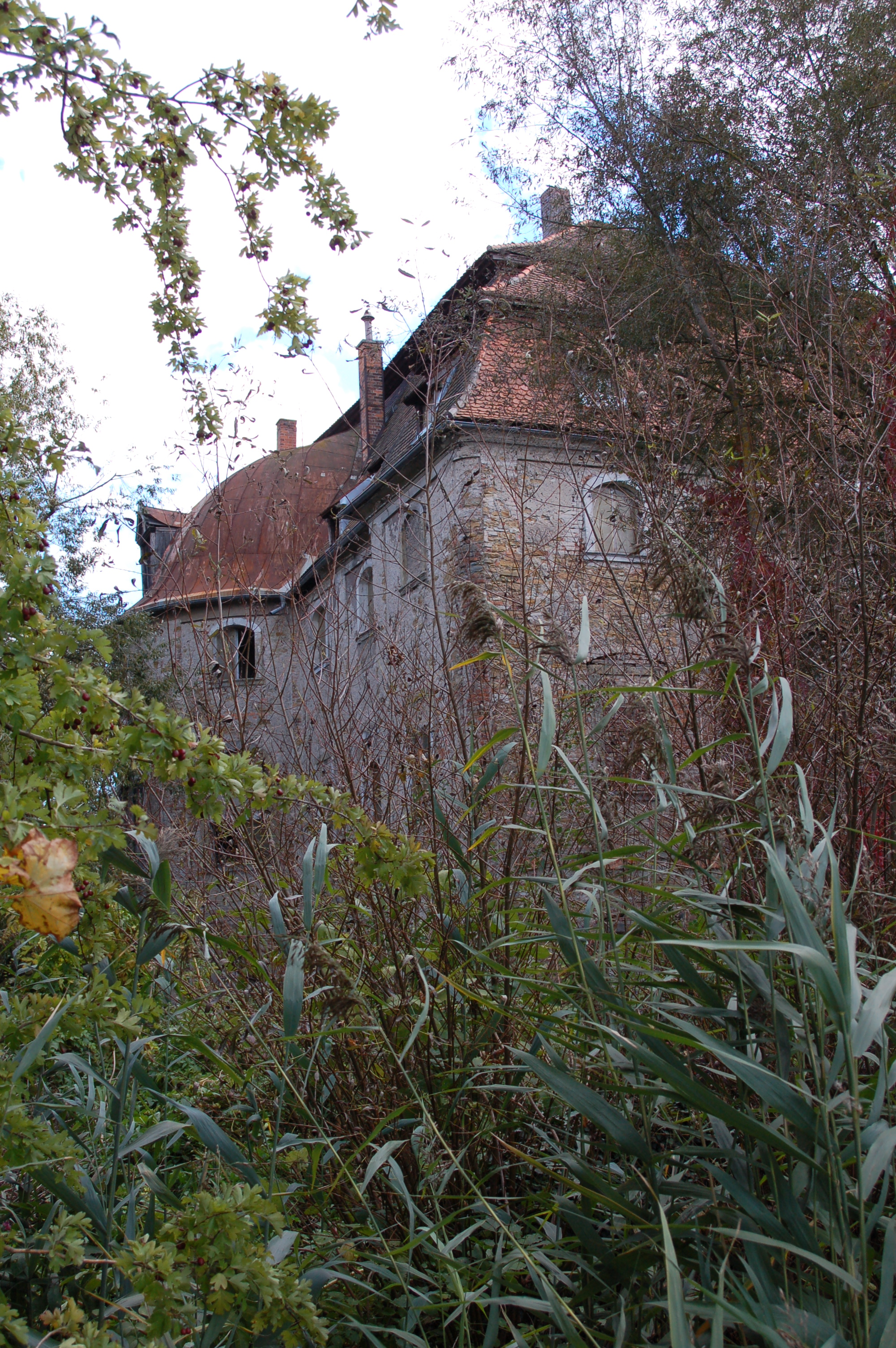 Schloss Pürkelgut in Regensburg, Nordseite